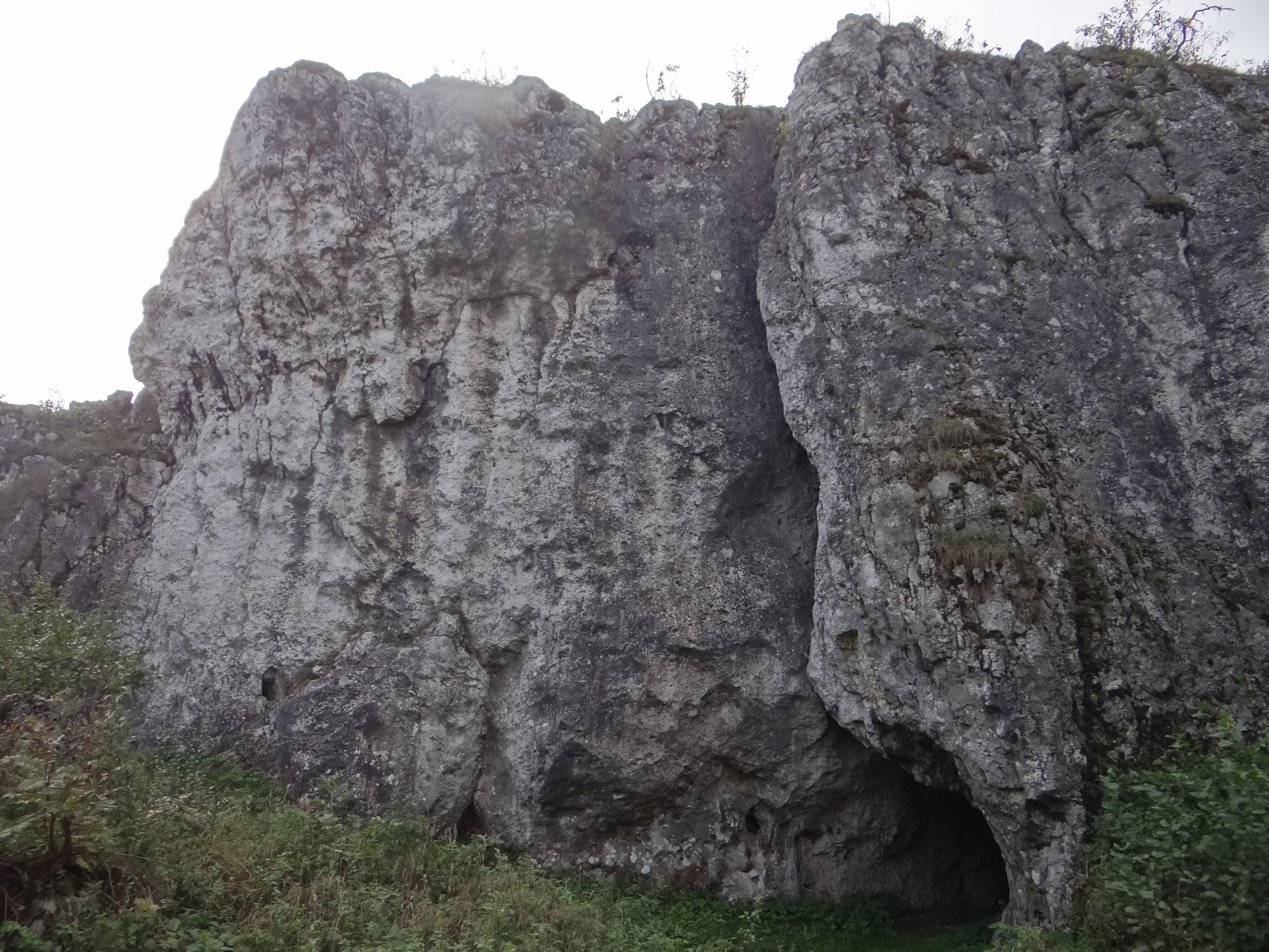 Żytnia Skała, ściana północna